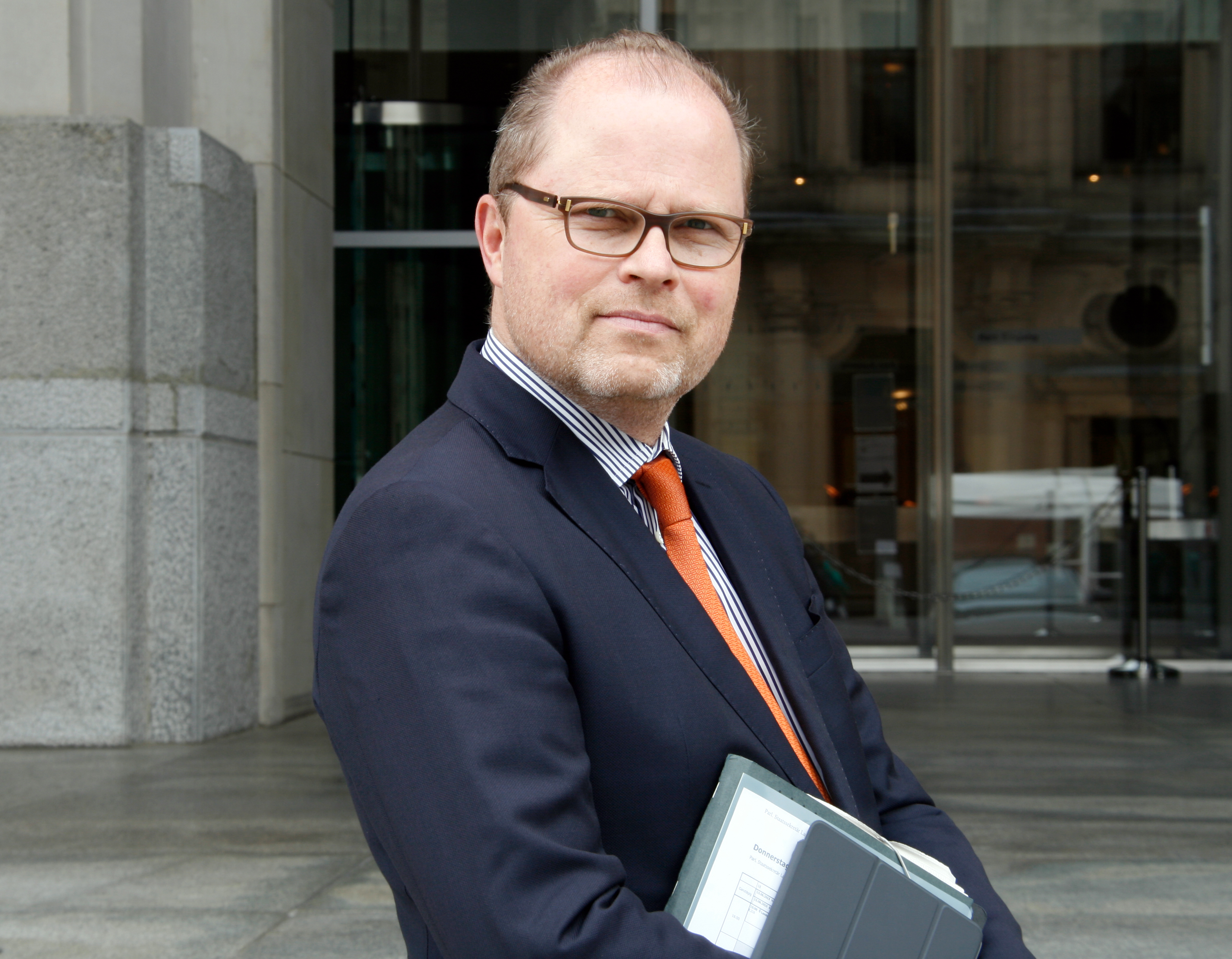 Christian Lange MdB, Parlamentarischer Staatssekretär im Bundesministerium der Justiz und für Verbraucherschutz